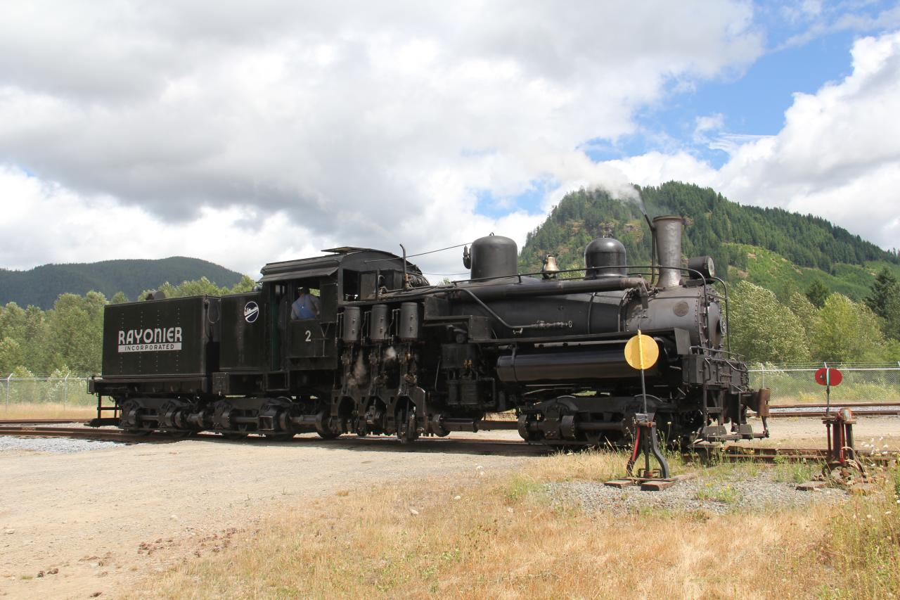 Number 2 - 4